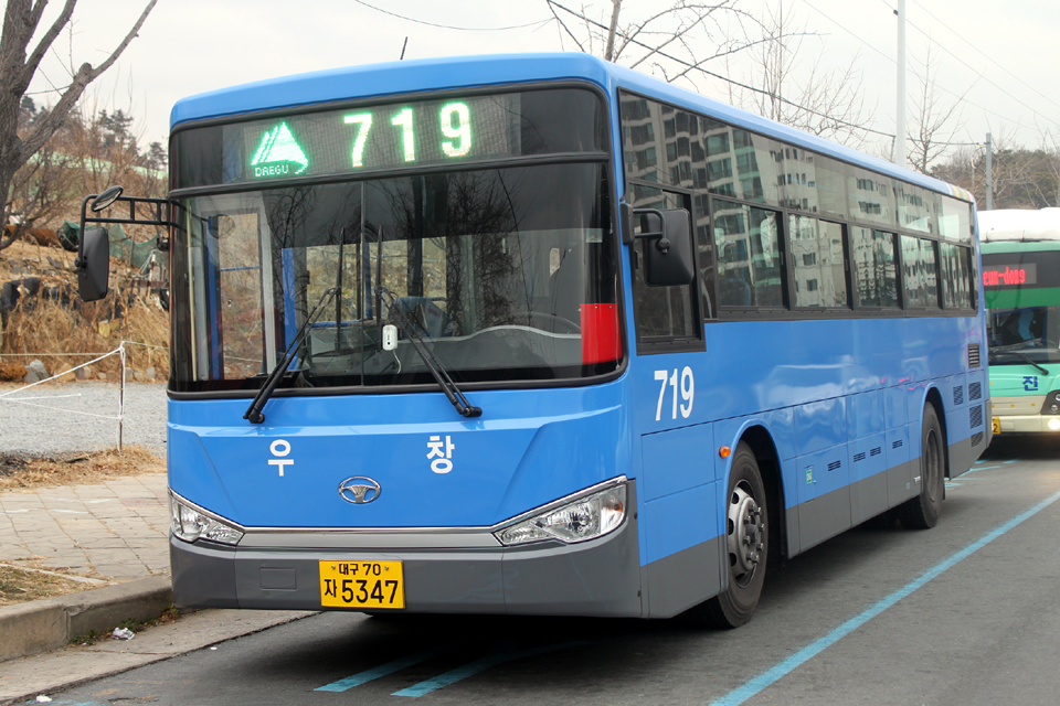 우창여객 소속 대우 NEW BS106